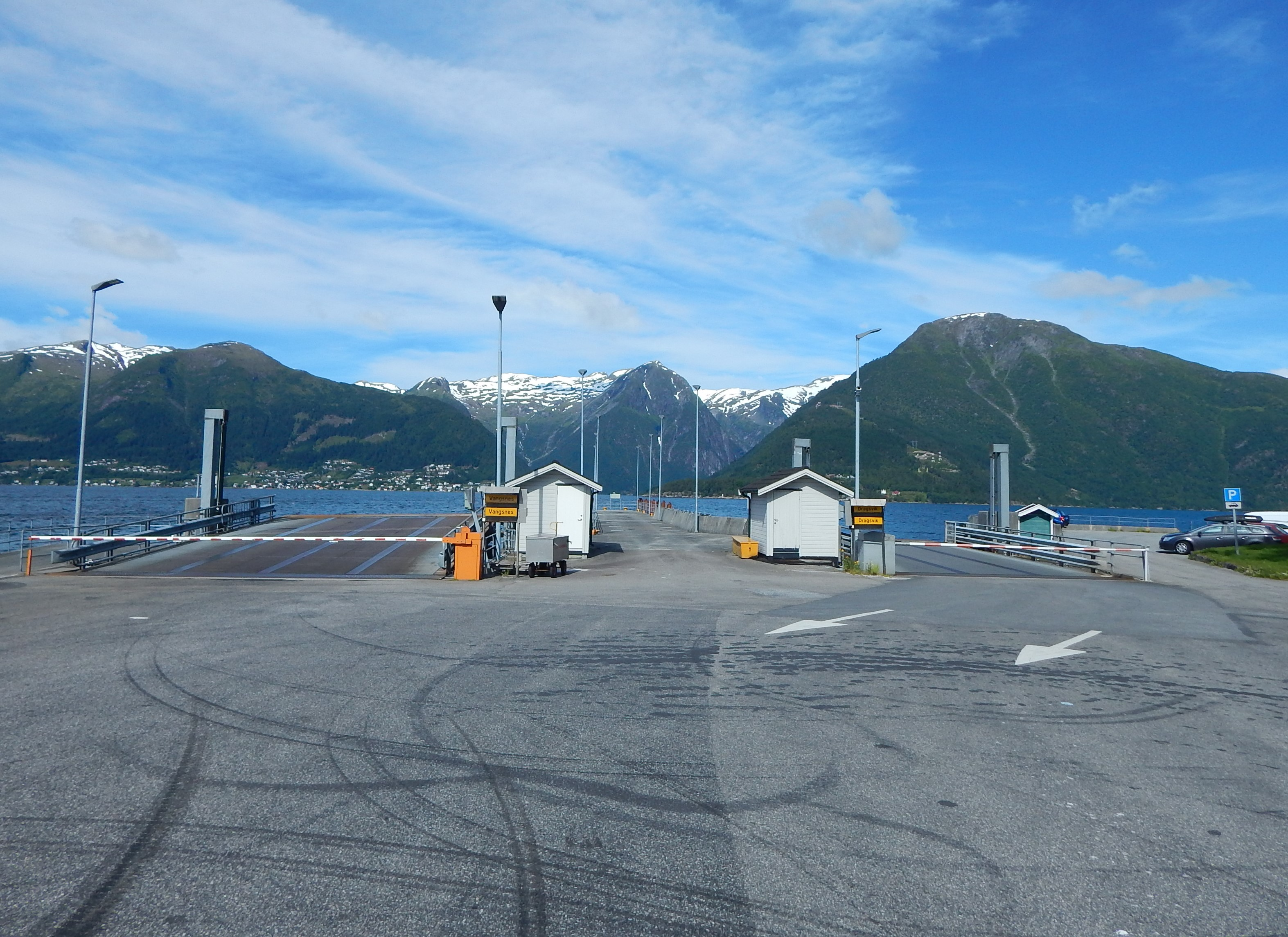 Hella fergekai